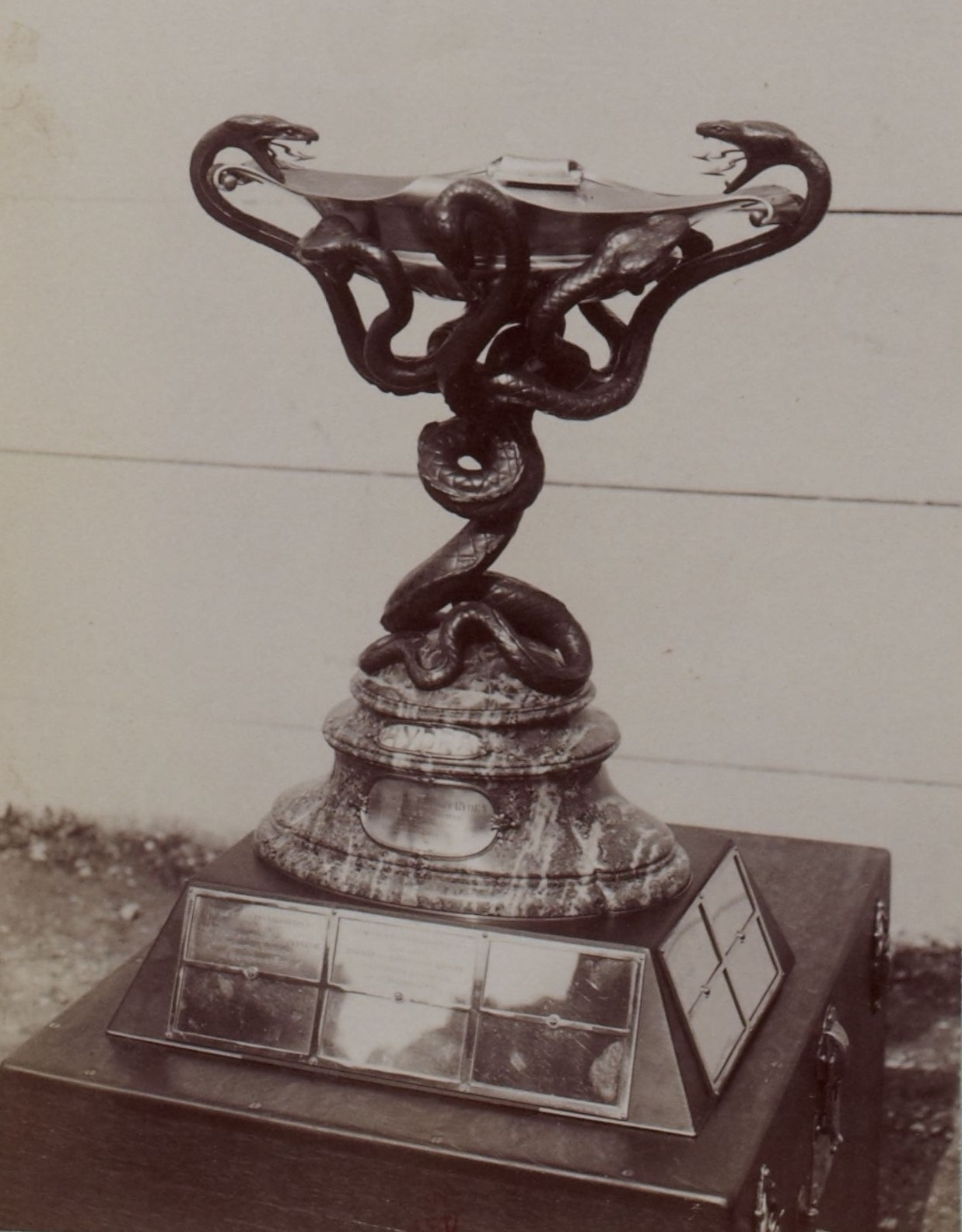 [Collection Jules Beau. Photographie sportive] : T. 29. AnnÃ©e 1905 / Jules Beau : F. 22. [Coupe Hydra, Parc des Princes, 6 avril 1905]